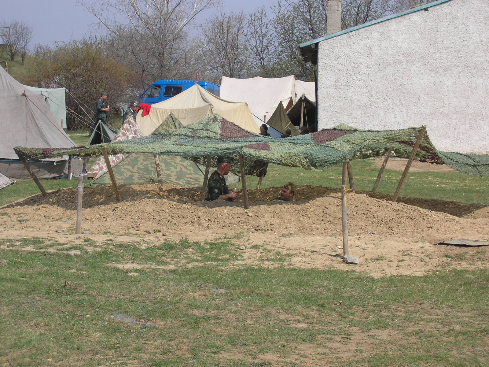 Ukázka polniho opevnění v Ořechově 2006